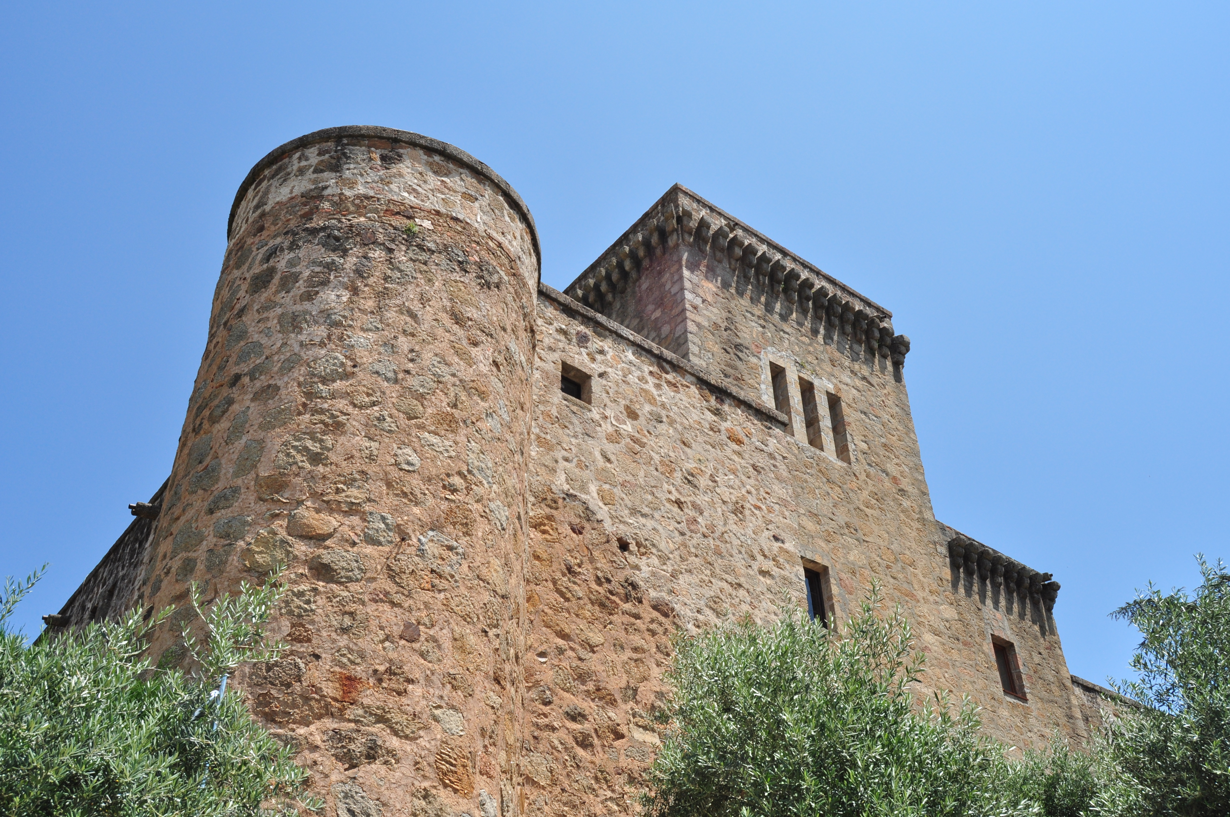 Jarandilla de la Vera - 009